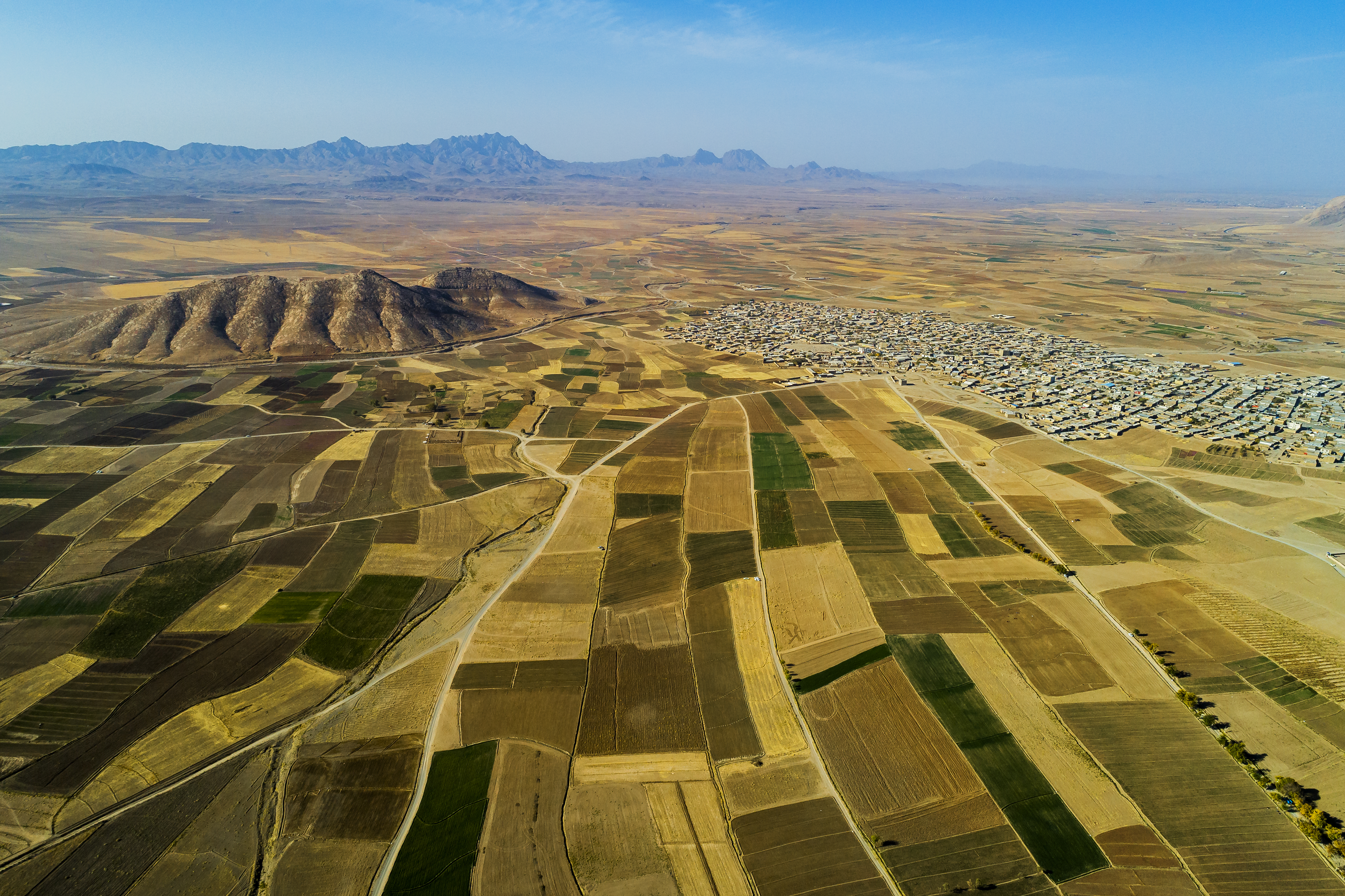 محوطه باستانی چخماق